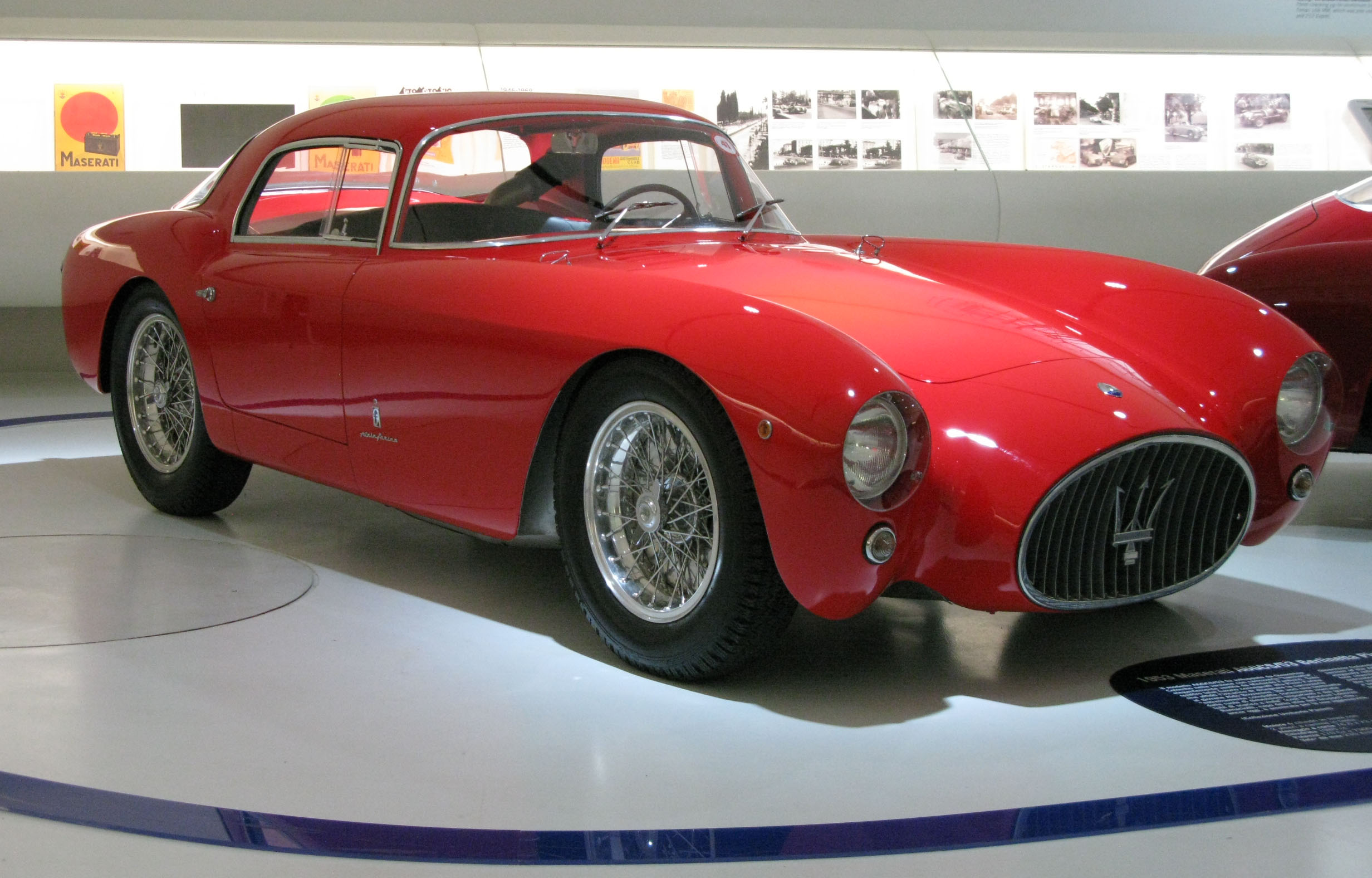 1953 Maserati A6GCS/53 Berlinetta